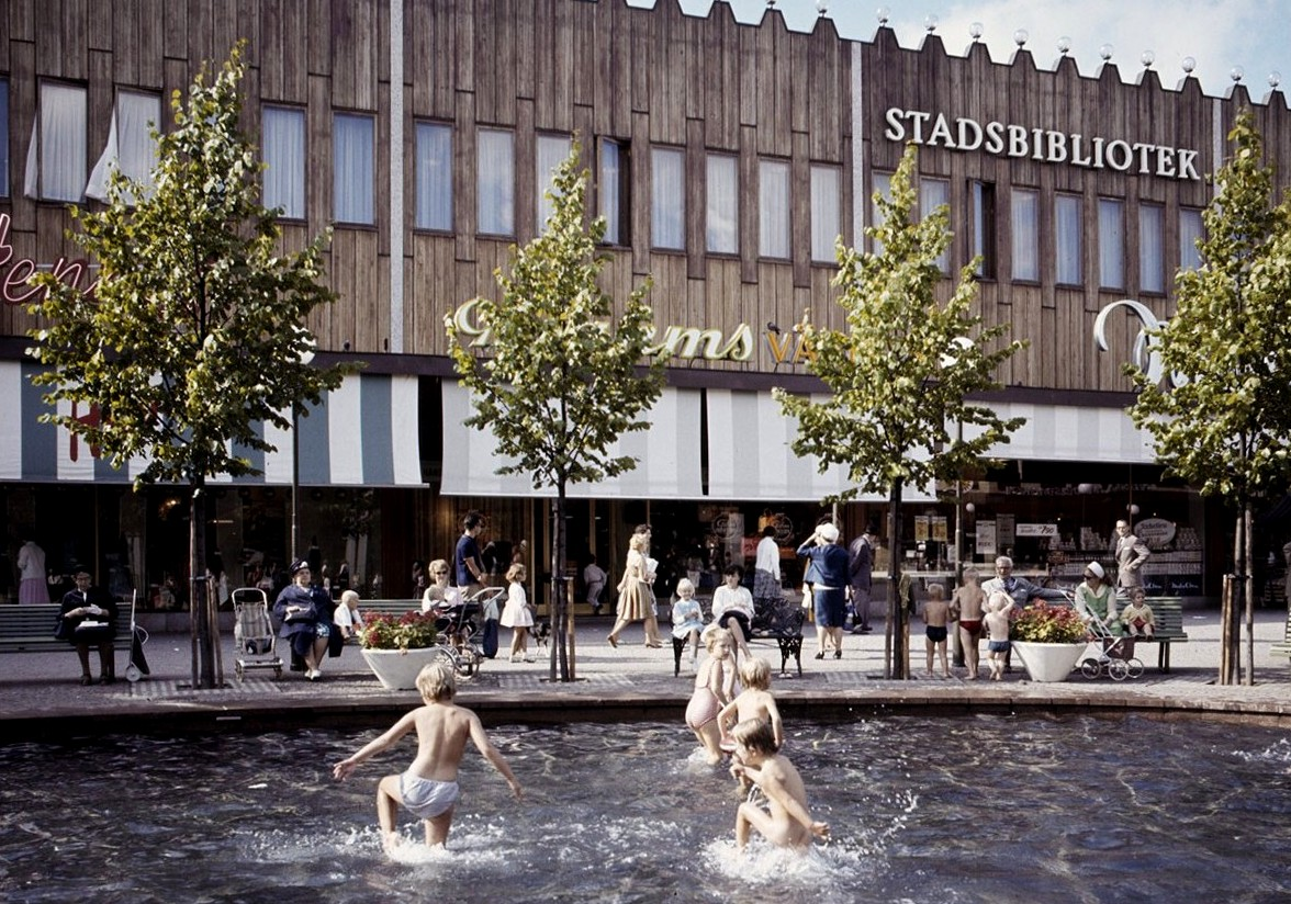 Badande barn i bassäng i Farsta centrum 1961